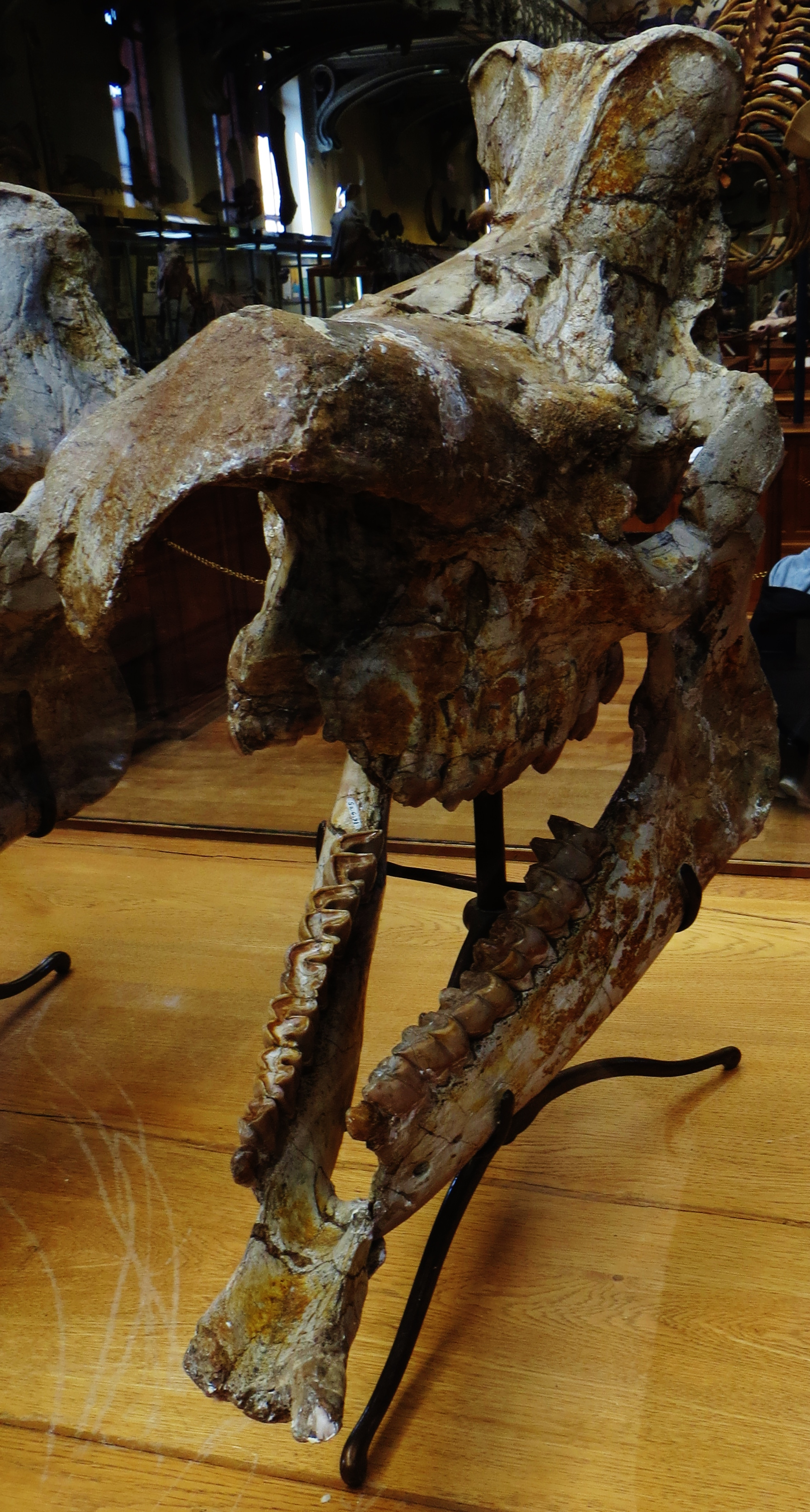 Fossil of Lartetotherium, an extinct mammal- Took the photo at Musee d'Histoire Naturelle, Paris